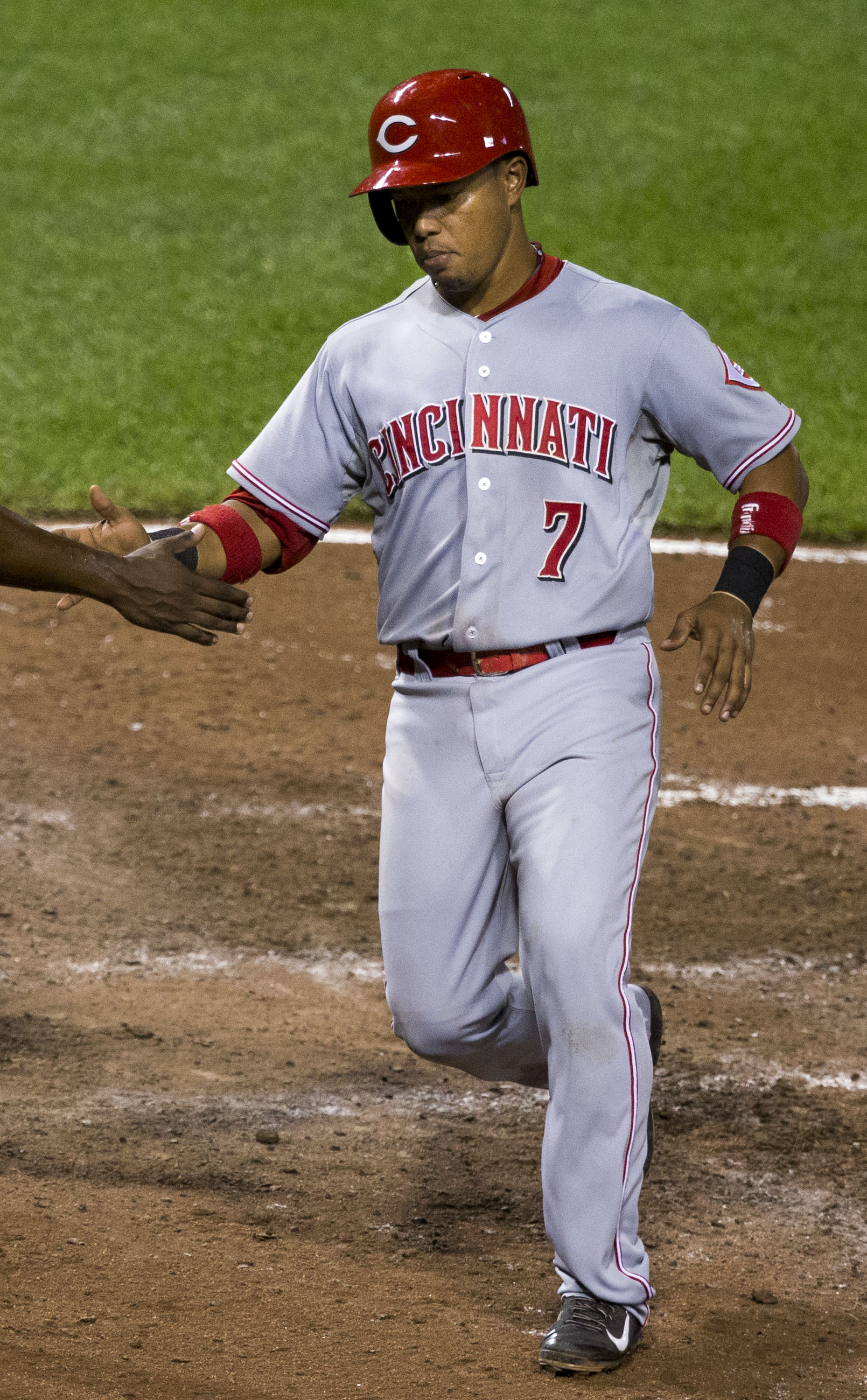 Ramón Santiago